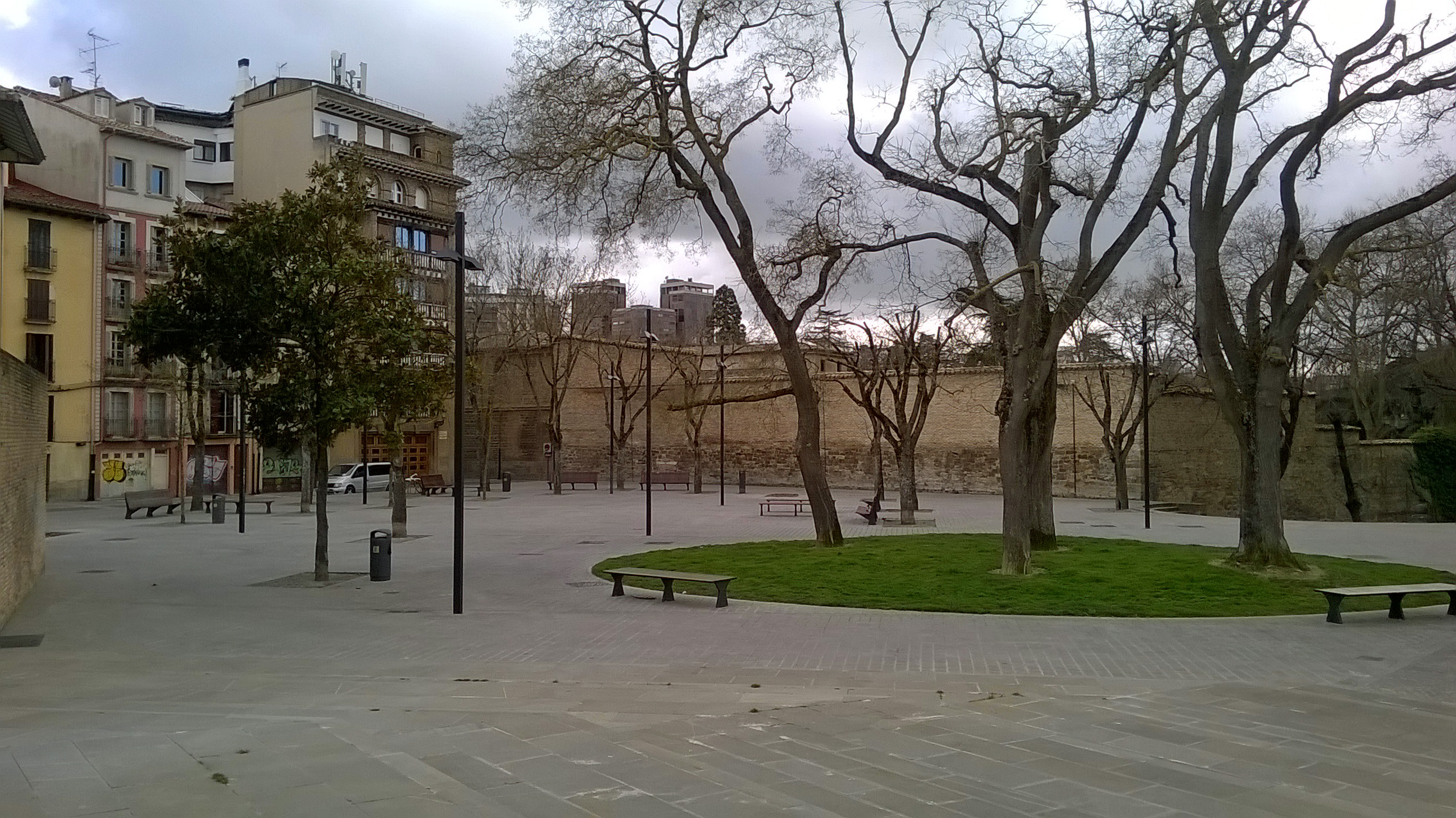 O-ko Andre Maria plaza, Iruñea, Nafarroa, Euskal Herria